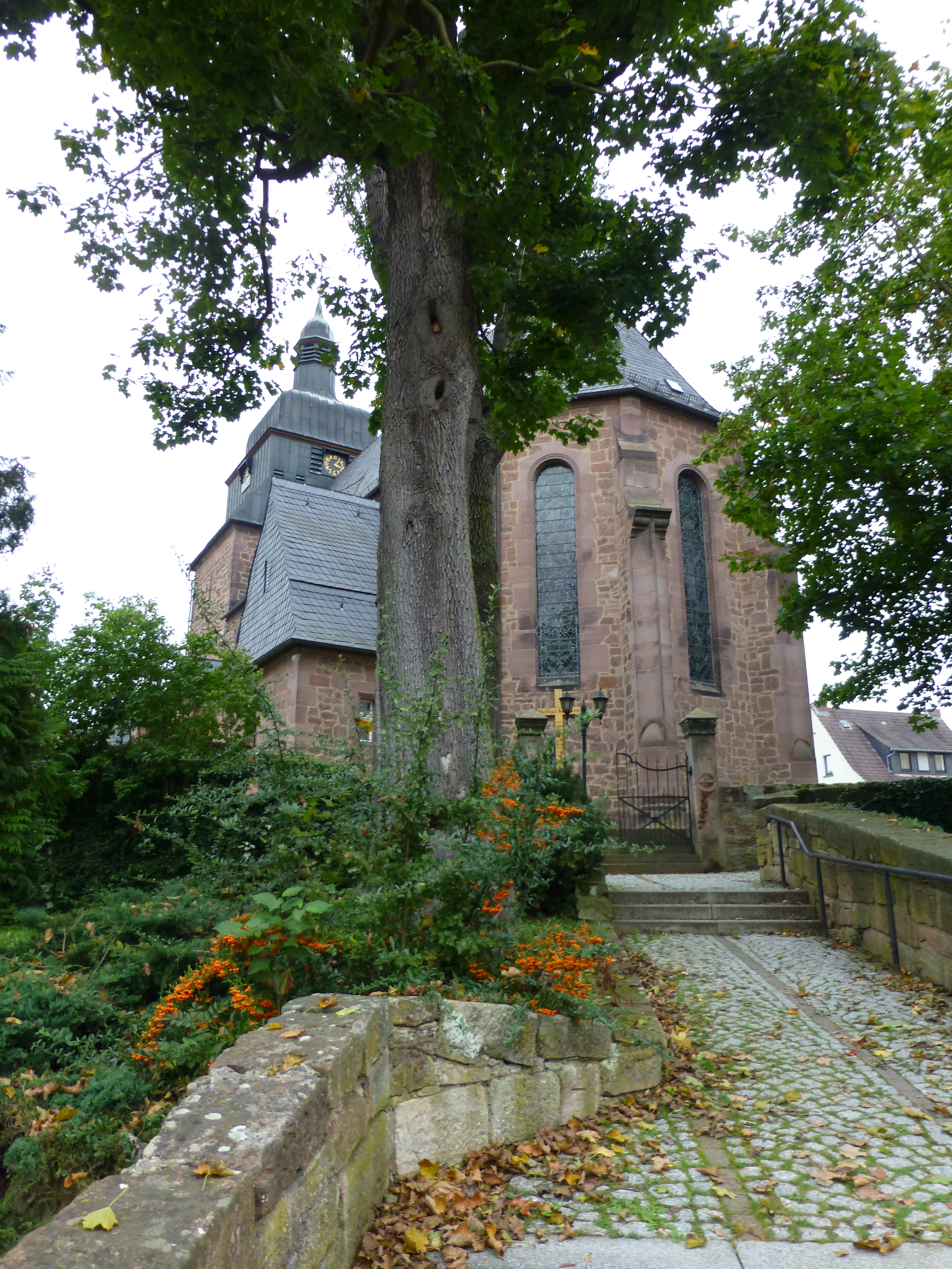 Kirche in Ershausen